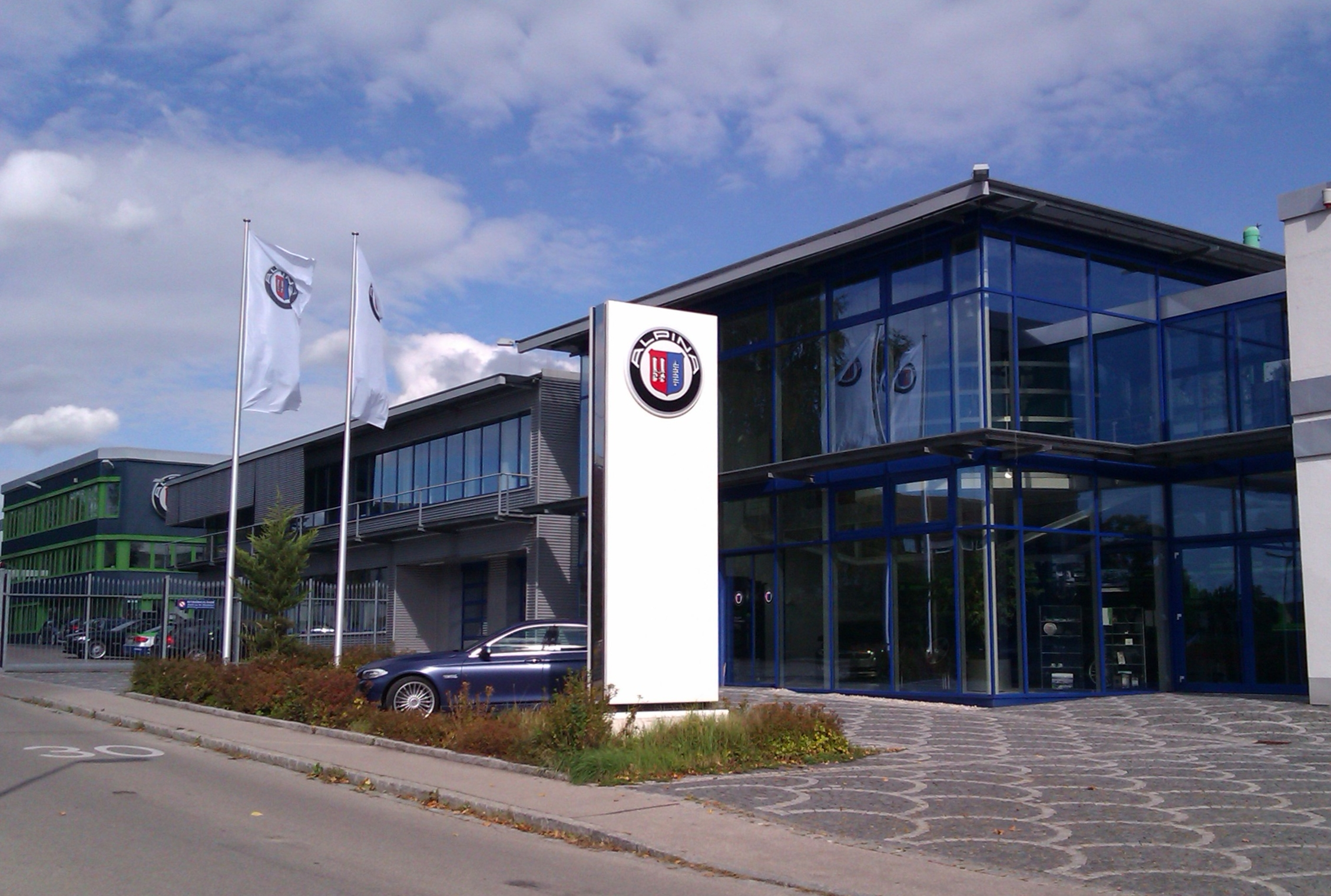 Alpina-Firmengelände in Buchloe